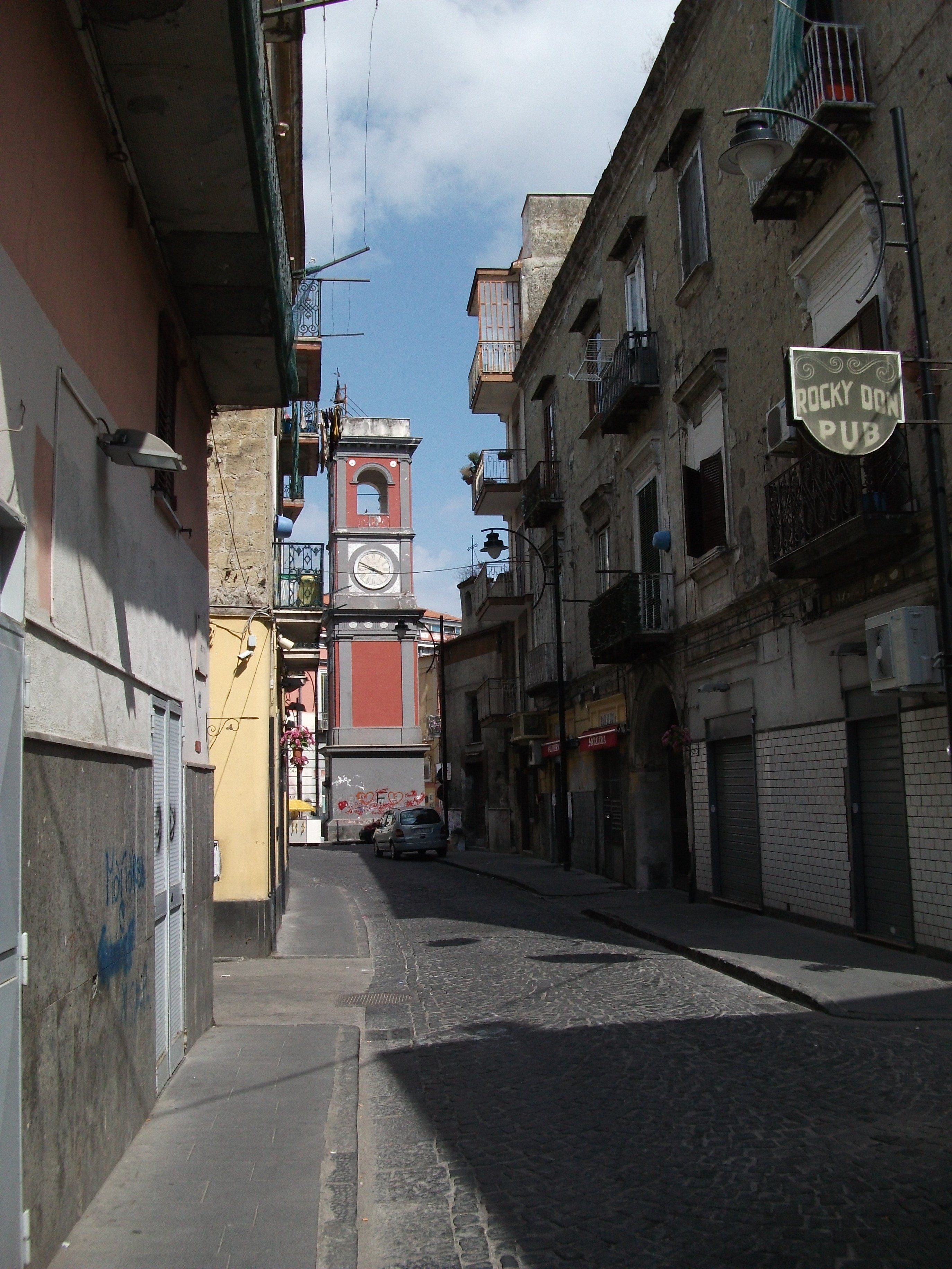 Arzano,Via Melito